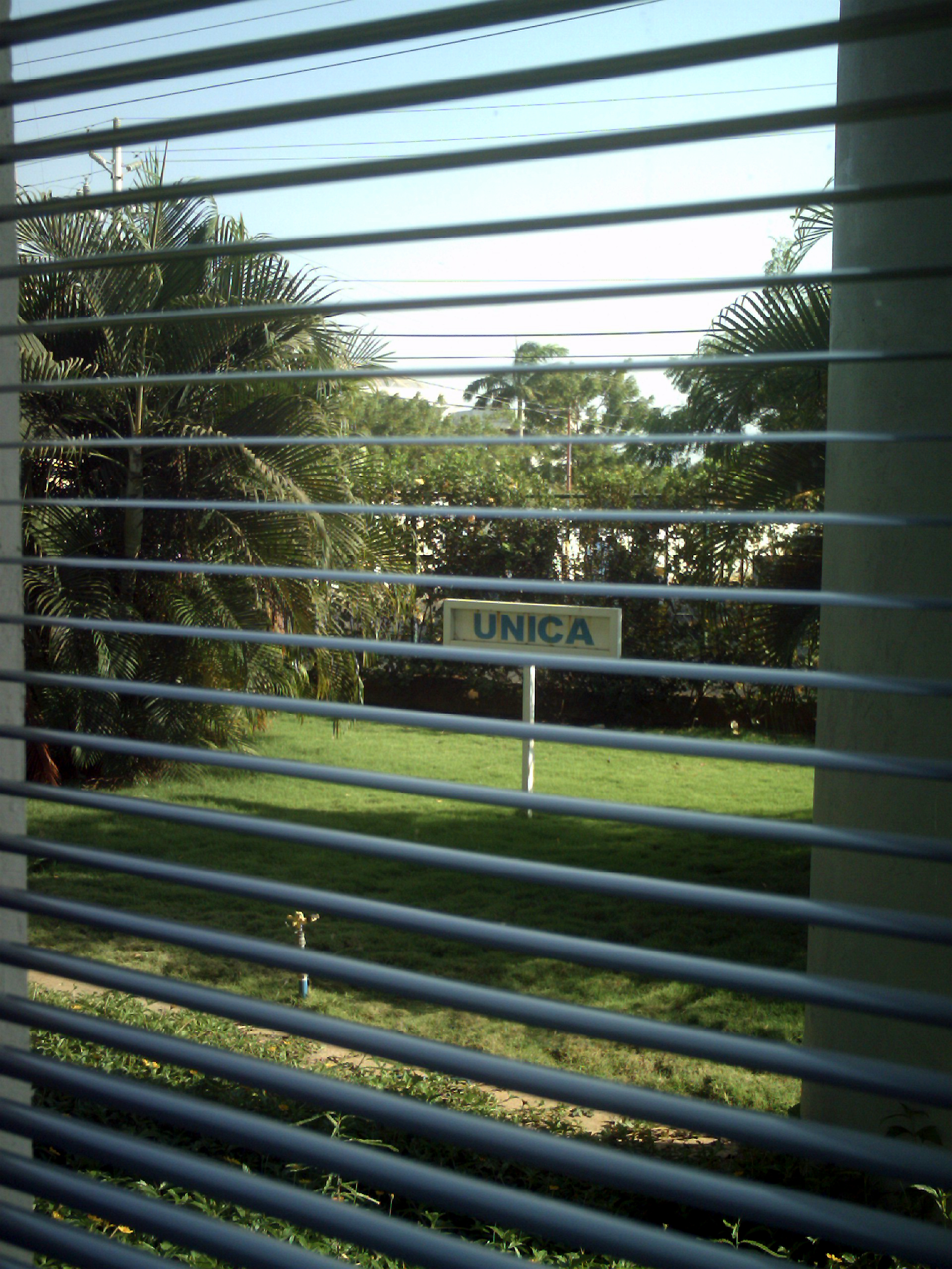 Áreas verdes en la Universidad Católica Cecilio Acosta, Maracaibo, Edo. Zulia, Venezuela.